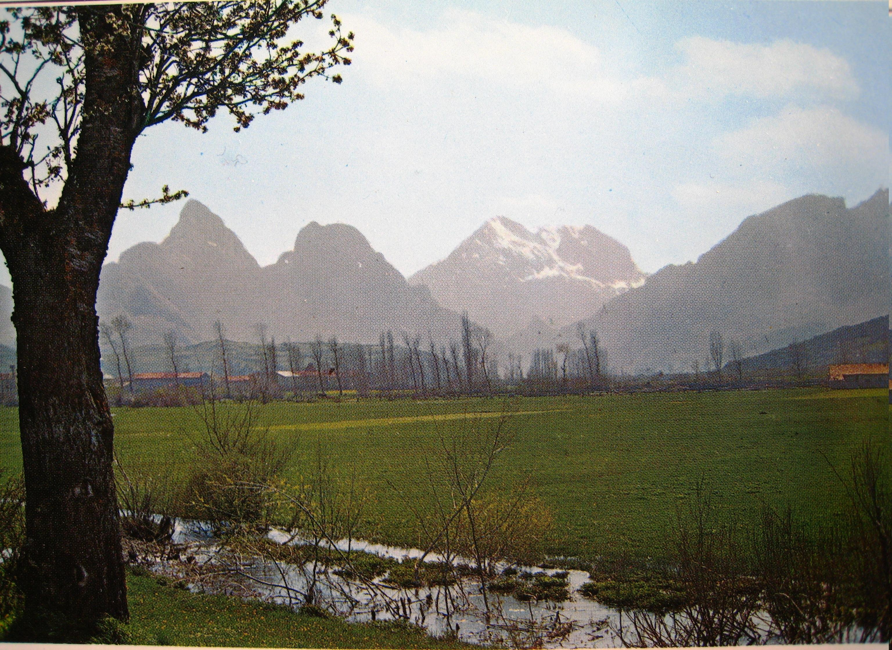 Vista del Valle de Riaño (León) en su estado original. Pocos años antes de que las grandes excavadoras y las aguas de un gran embalse posteriormente, destruyeran los pueblos y anegaran este precioso Valle